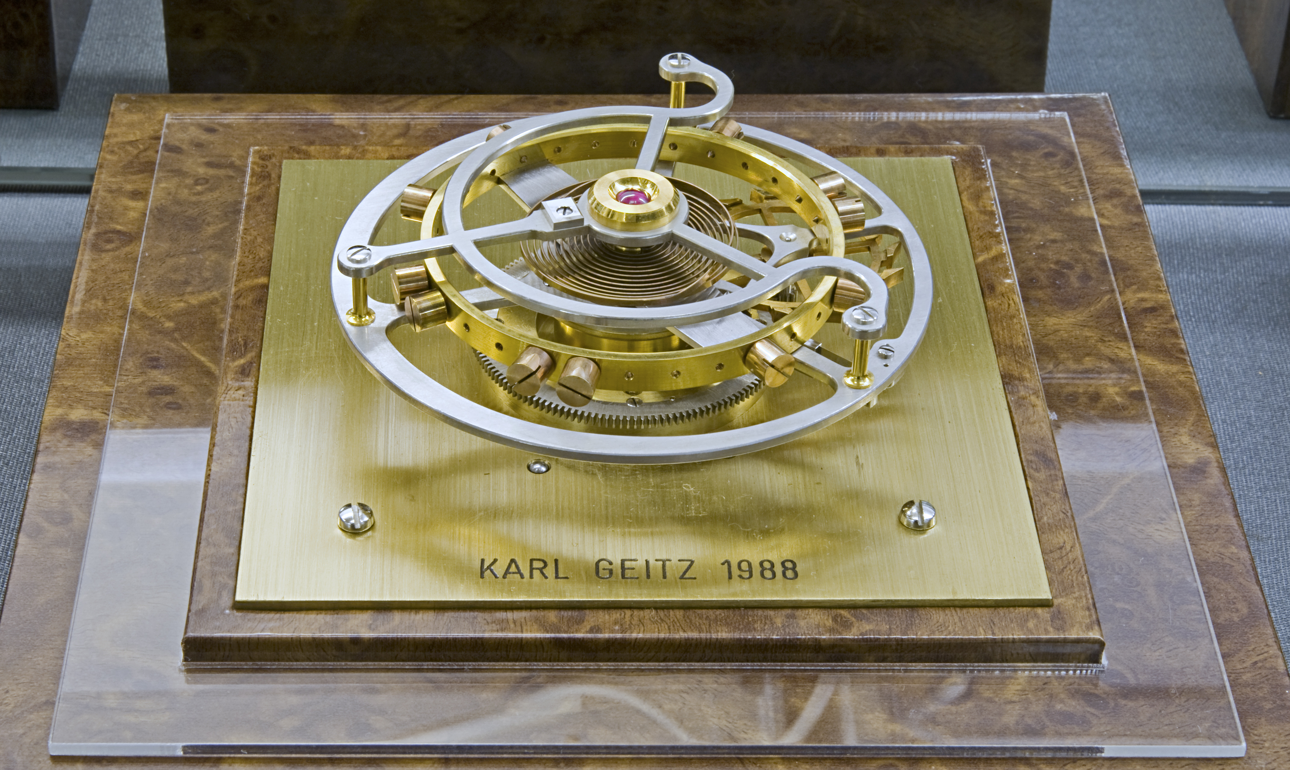 Museum für Uhren, Schmuck und Kunst Frankfurt am Main Hemmungsmodell "Tourbillon" von Karl Geitz aus dem Jahr 1988